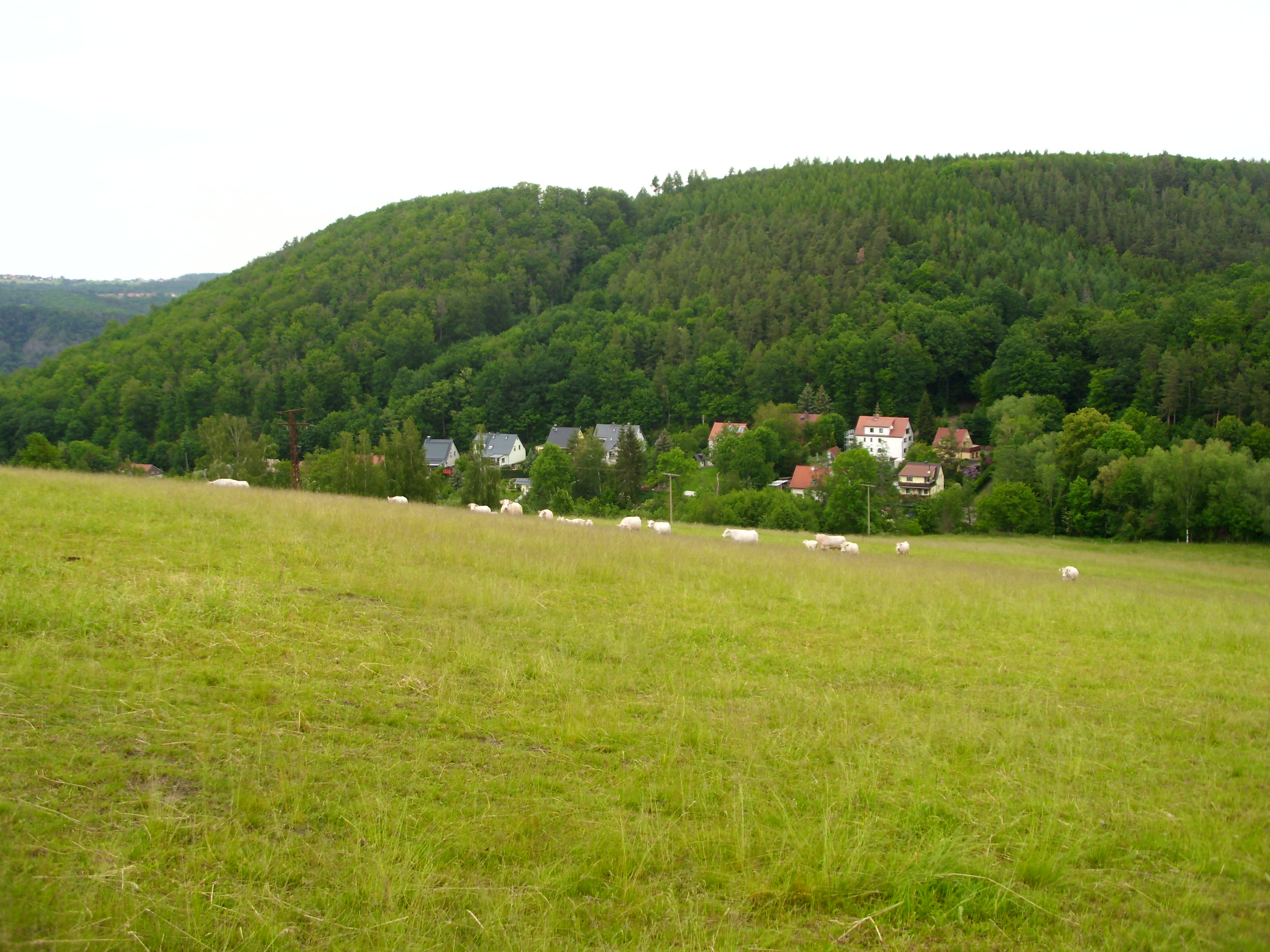 Blick von Rabenau zum Vorholz mit der Vorholzsiedlung von Obernaundorf